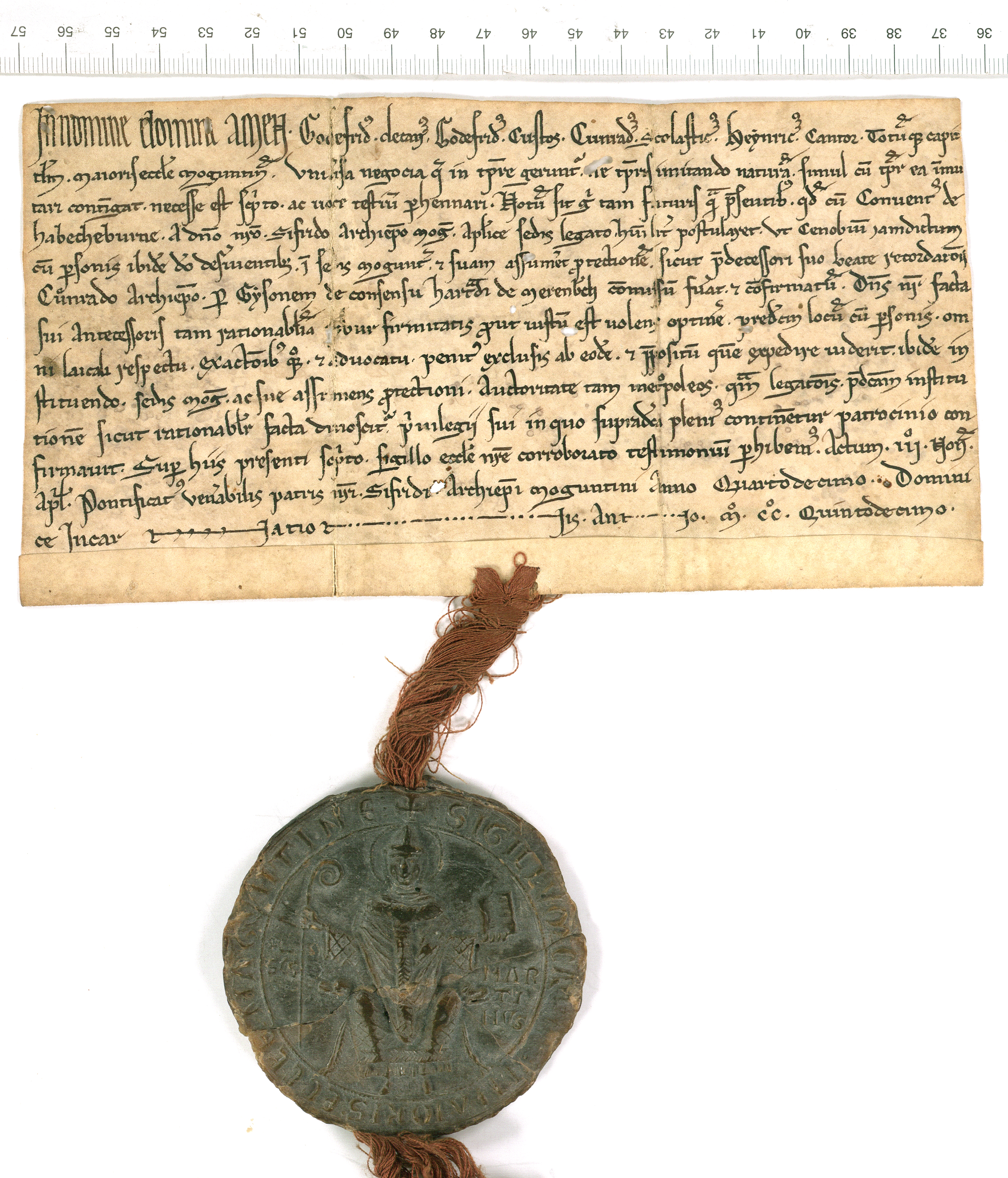 Schutzbrief Erzbischofs Siegfried von Mainz für das Kloster Hachborn. Das Mainzer Domkapitel bestätigt die Schutzerteilung für das Kloster Hachborn durch Erzbischof Siegfried von Mainz.